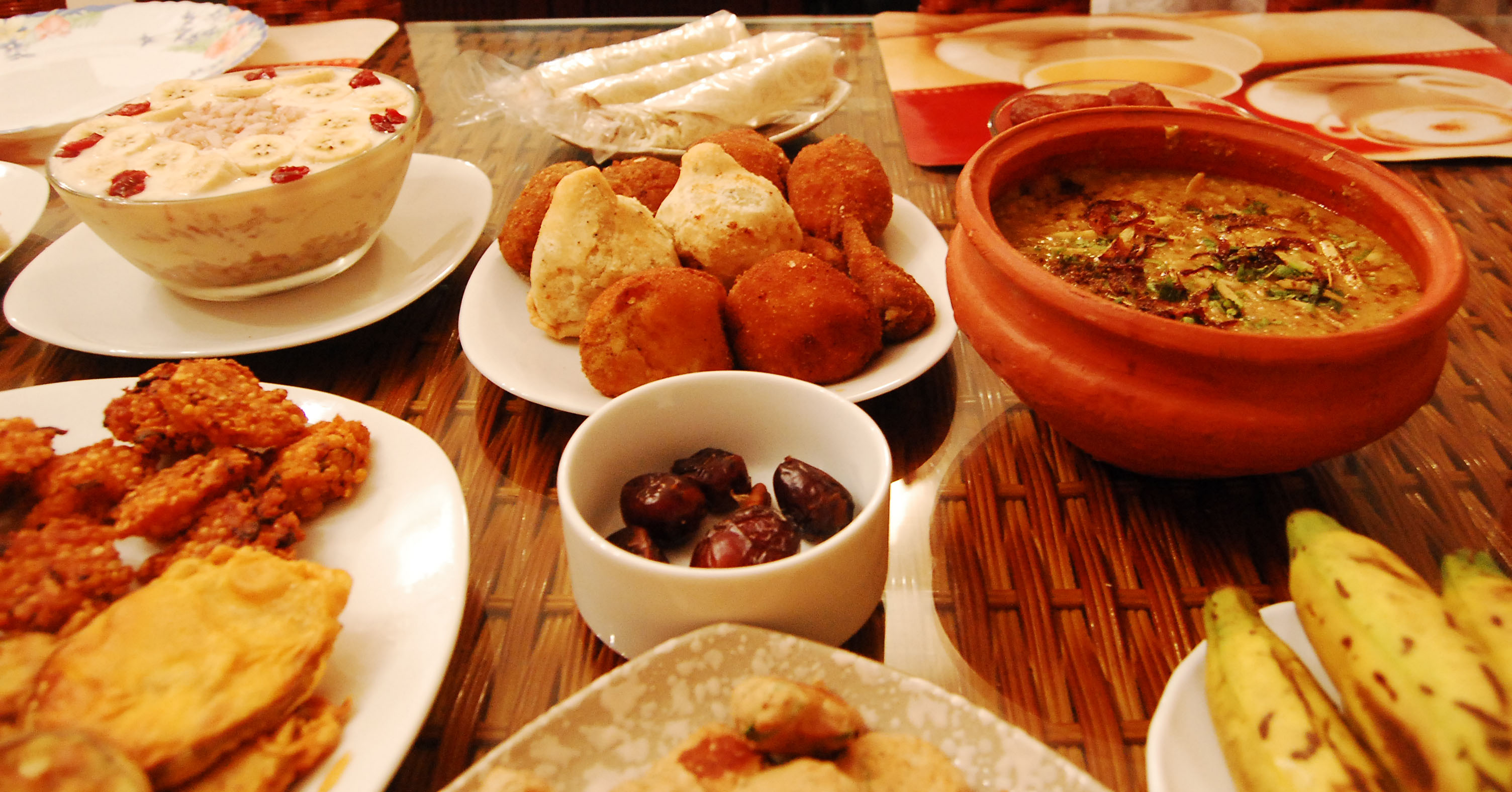 Iftar for Ramadan